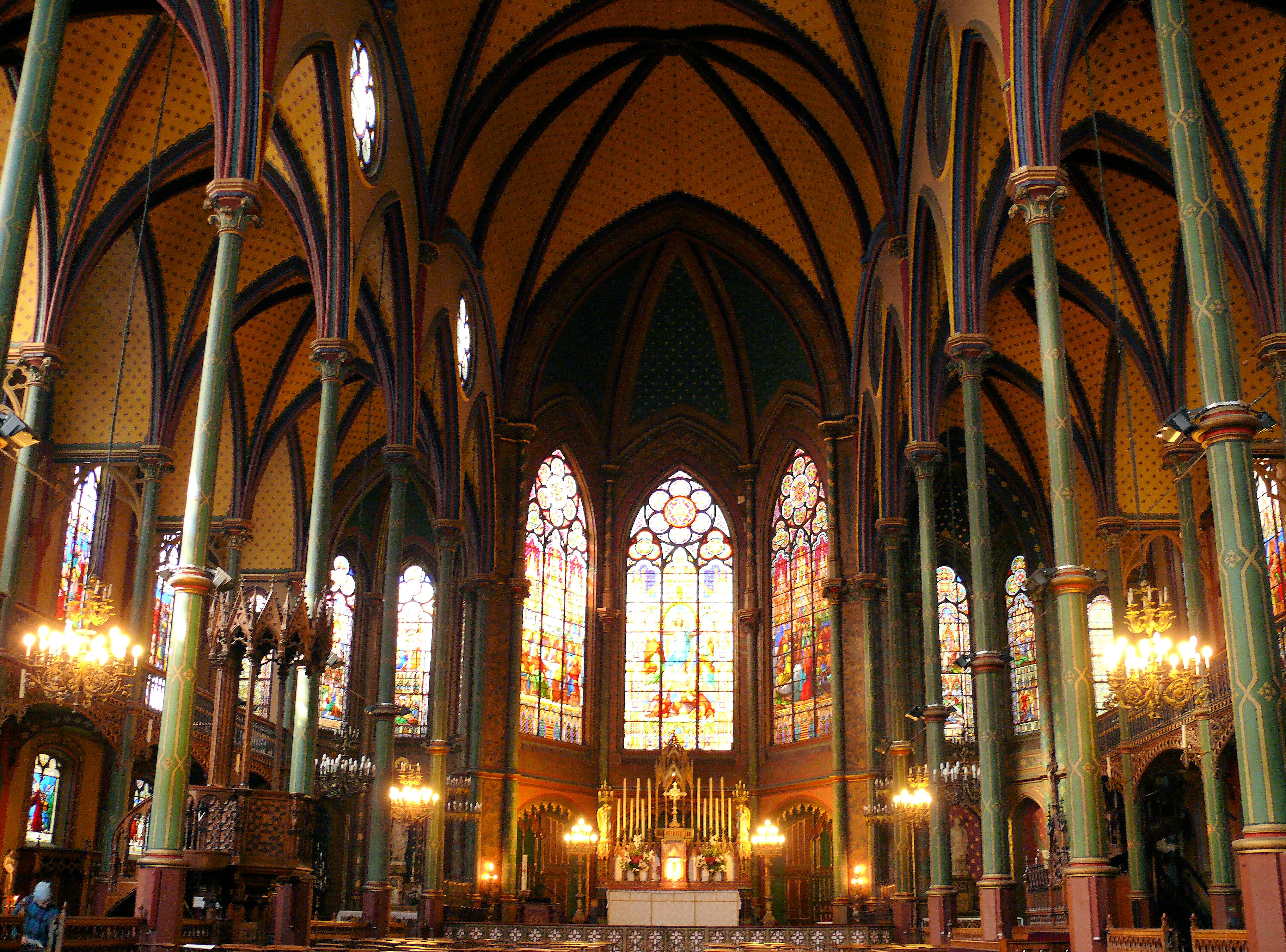 Paris 9ème arrondissement - Eglise Saint-Eugène-Sainte-Cécile